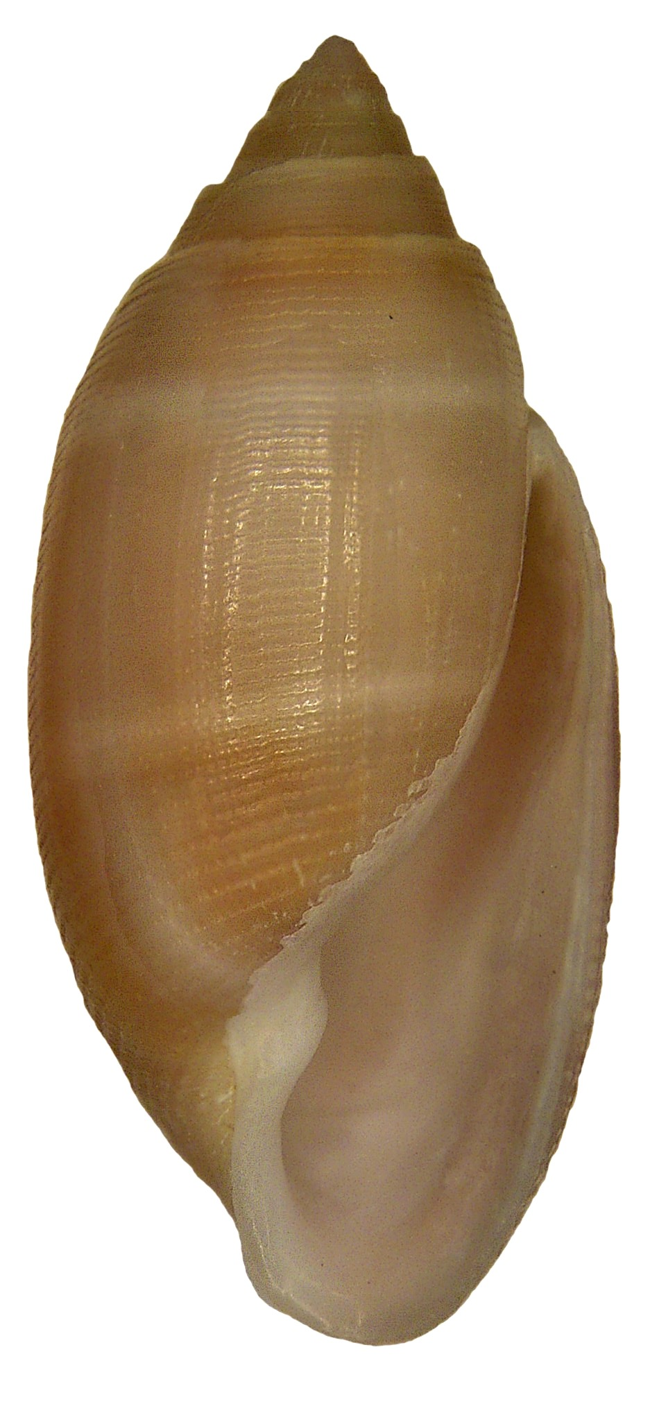 Familie: Volutidae Groesse: 25 mm Verbreitung: Norwegen bis Westafrika, Mittelmeer Fundort: Italia, Adria, Milano Marittima leg.det. U.Schmidt, 1984 Photo: U.Schmidt, 2008